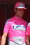 Javier Ruiz de Larrínaga, Kaiku, Euskal Bizikleta 2005